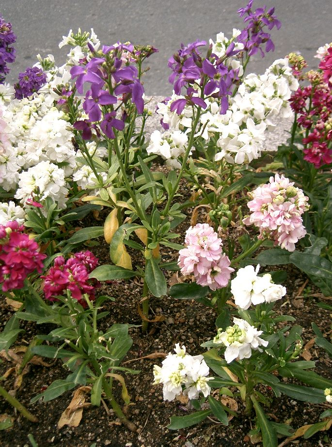 Matthiola incana